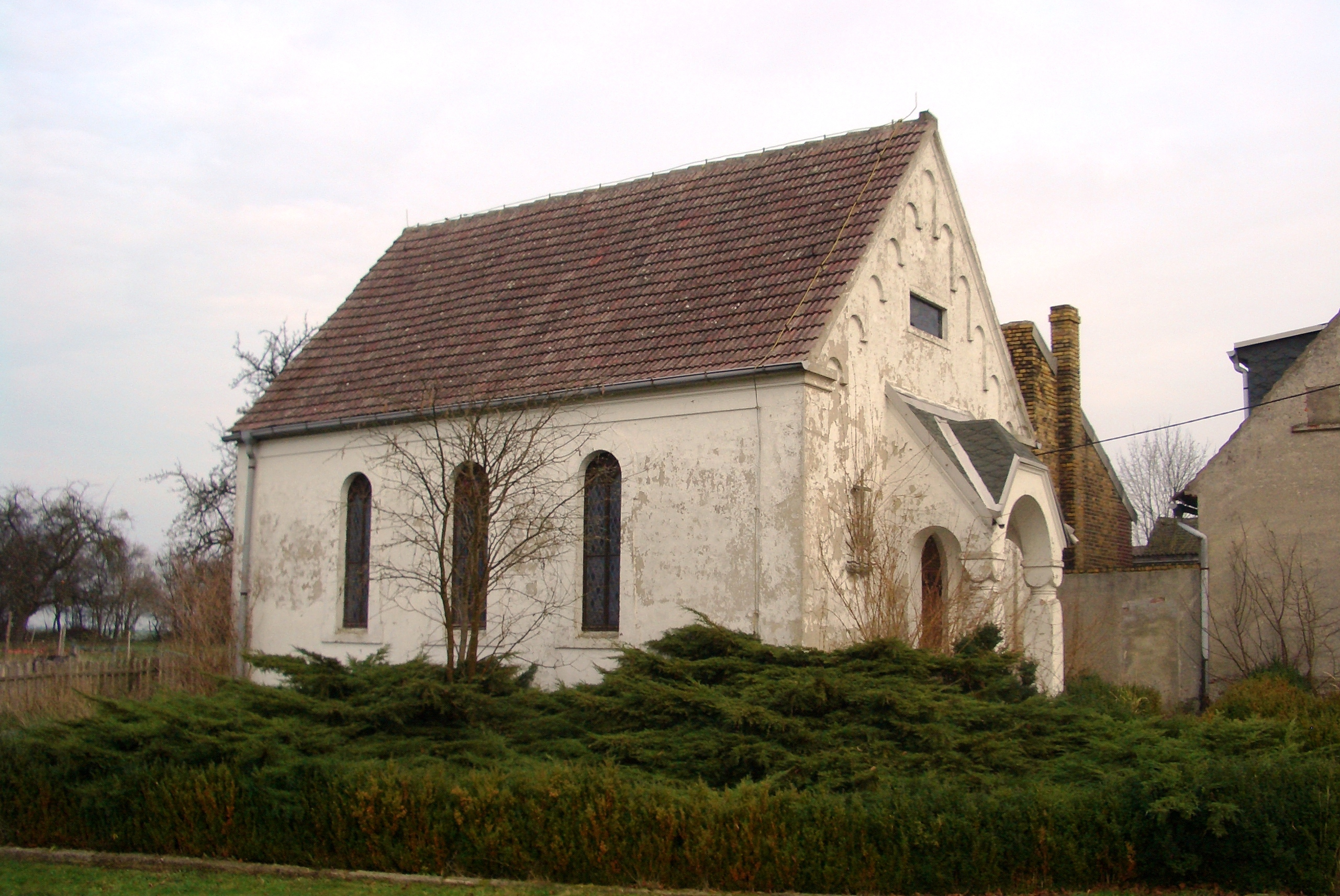 Kapelle Wahlsdorf, Außenansicht von Dorfstraße aus